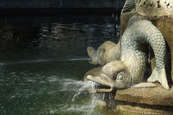 Fuente en el Parque de El Capricho (Madrid)